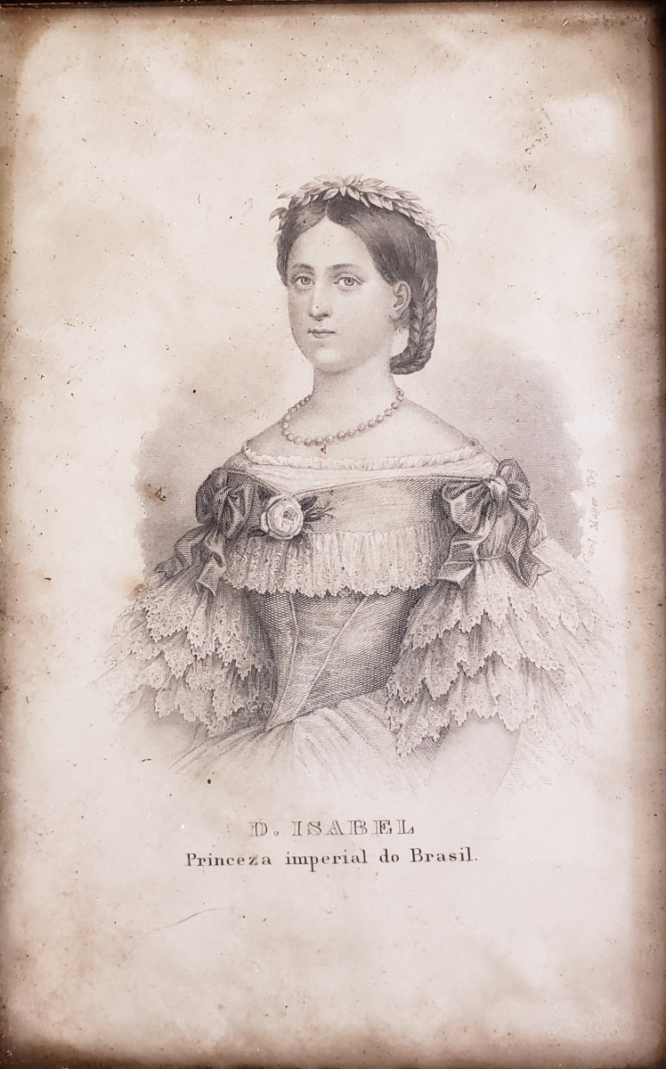 (Dona Isabel I)